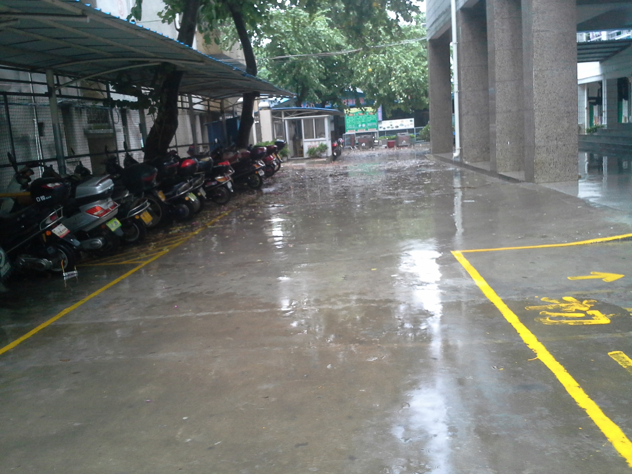 学校内部